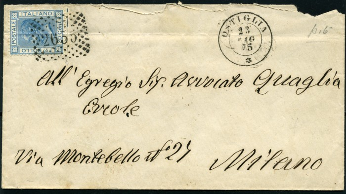 Immagine proveniente da collezione personale dell'autore ritraente busta del Regno d'italia con annullo numerale.